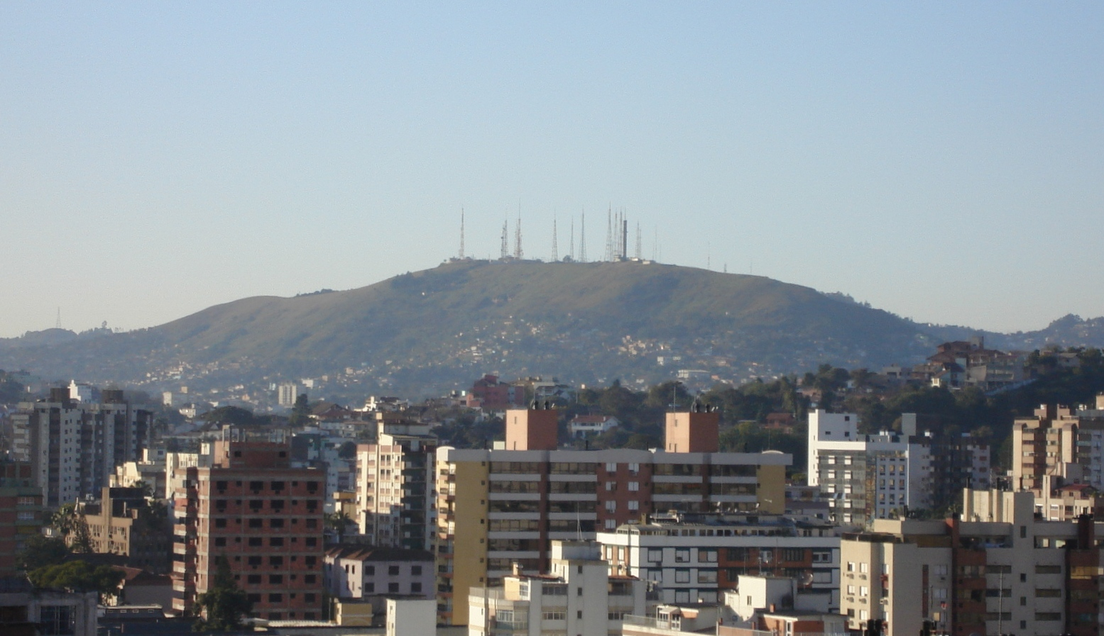 Morro da Polícia (também chamado "da Glória"), localizado em Porto Alegre, RS.